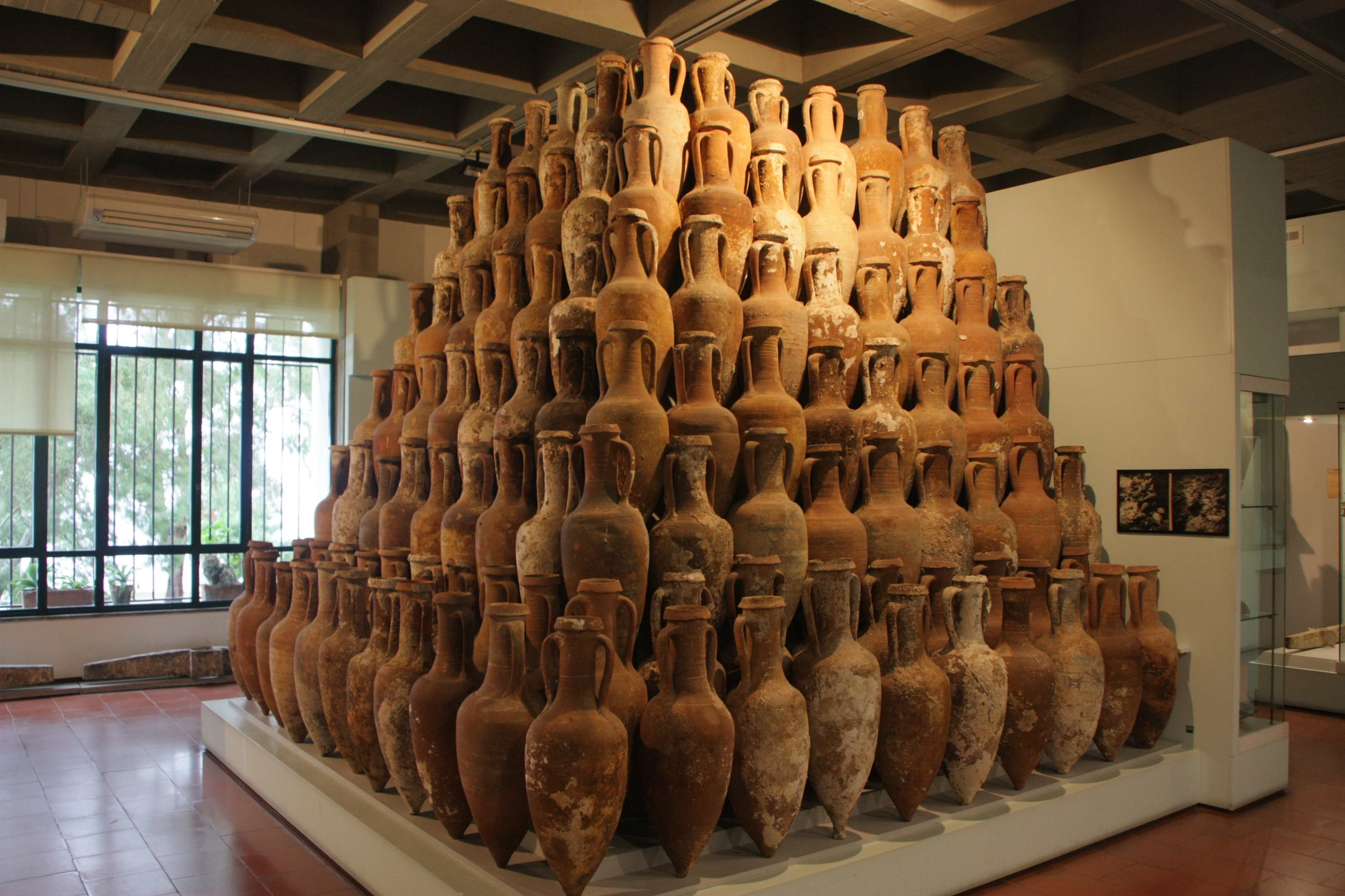 Anfore sezione subacquea